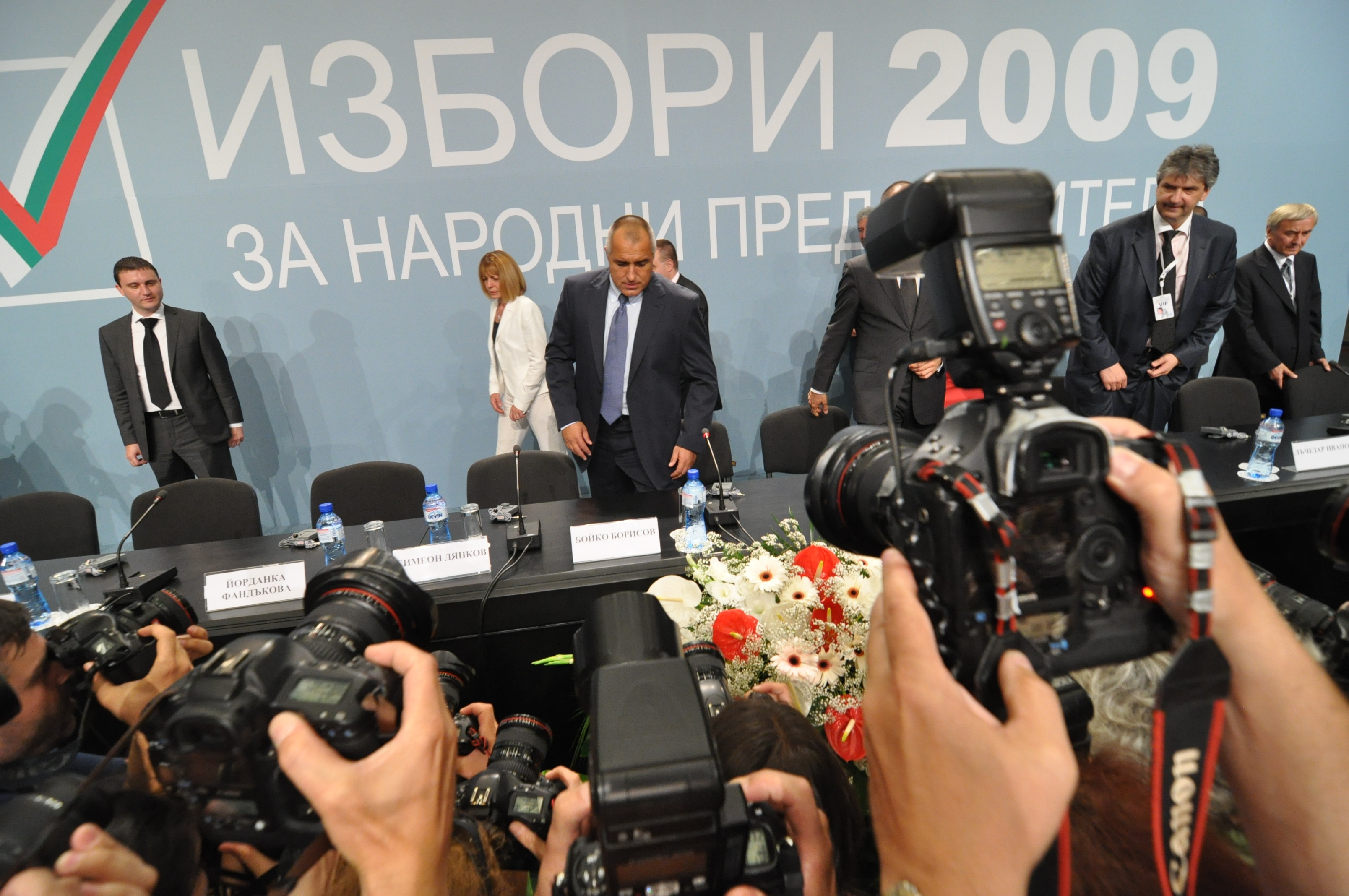 Мнозинството от фоторепортерите ползваха Канон. Ще ги познаете по червената линия в началото на обектива - това им е професионалната серия.